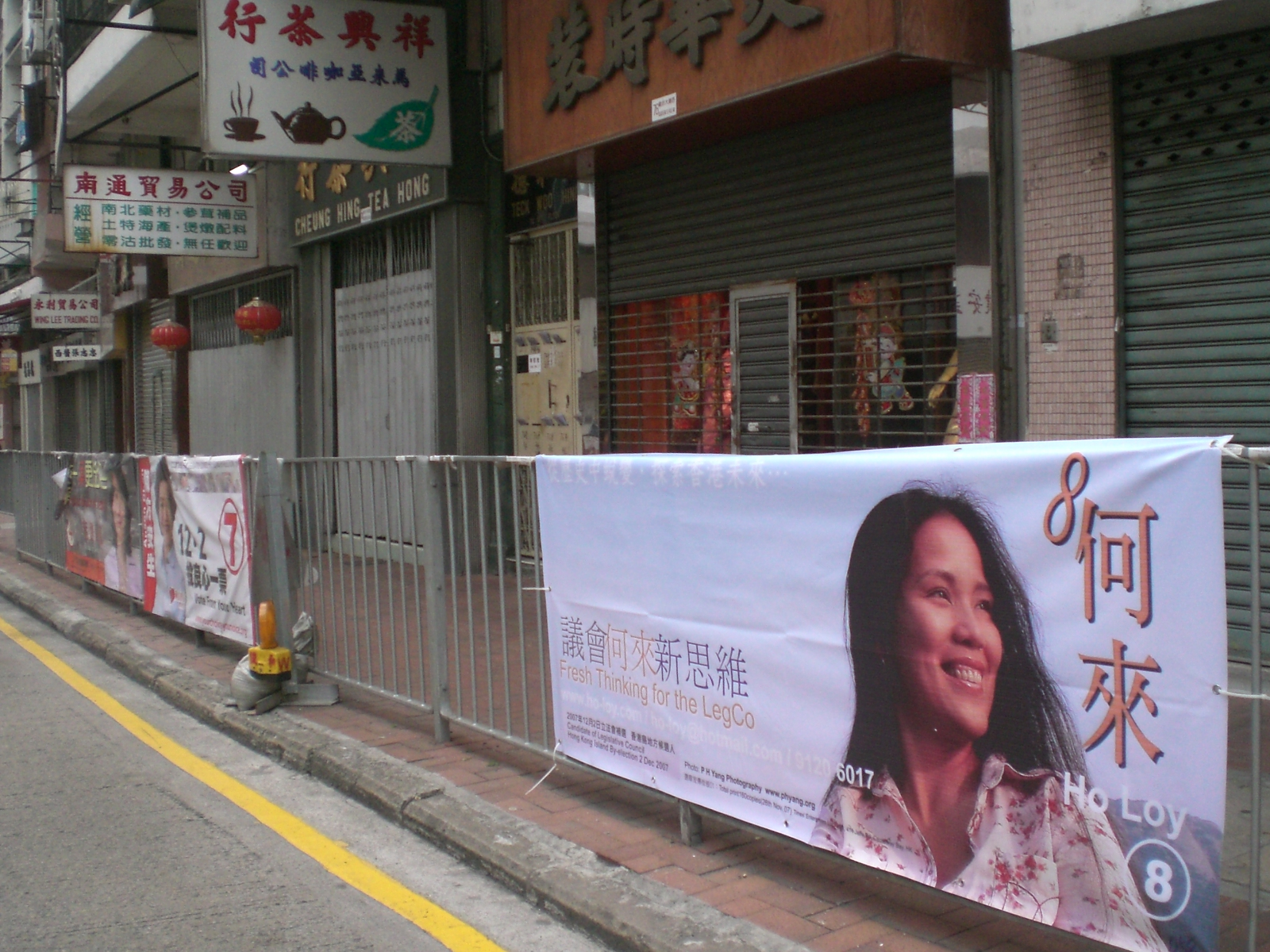 2007年香港立法會港島選區補選Banners 位於上環皇后大道西近皇后街的街邊宣傳橫額 何來